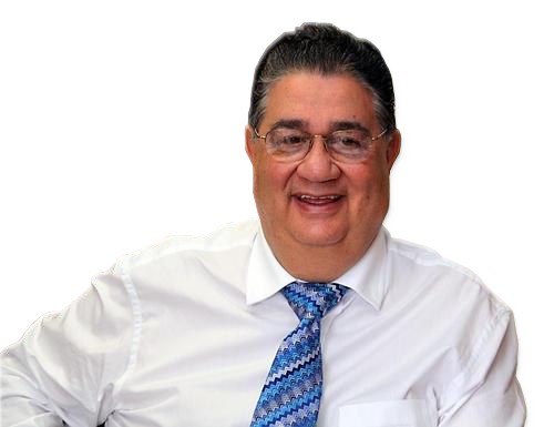 Márcio Reinaldo Dias Moreira